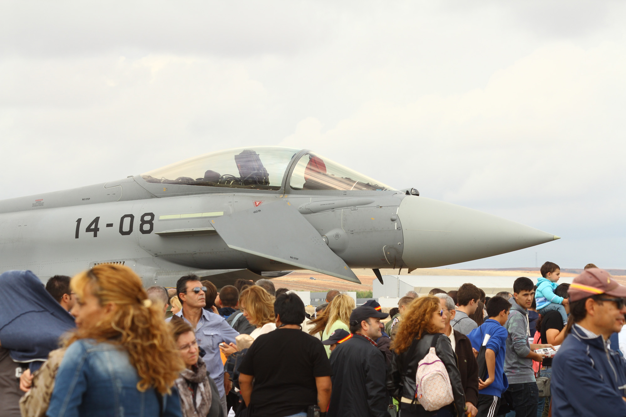 Festival Aéreo Internacional Aire75, celebrado el 11 de octubre de 2014 en la Base Aérea de Torrejón de Ardoz, Madrid, con motivo del 75º aniversario del Ejército del Aire de España. Aire75 International Airshow, held on October 11, 2014 at the Torrejón de Ardoz Air Base, Madrid, to celebrare the 75th anniversary of the Spanish Air Force.